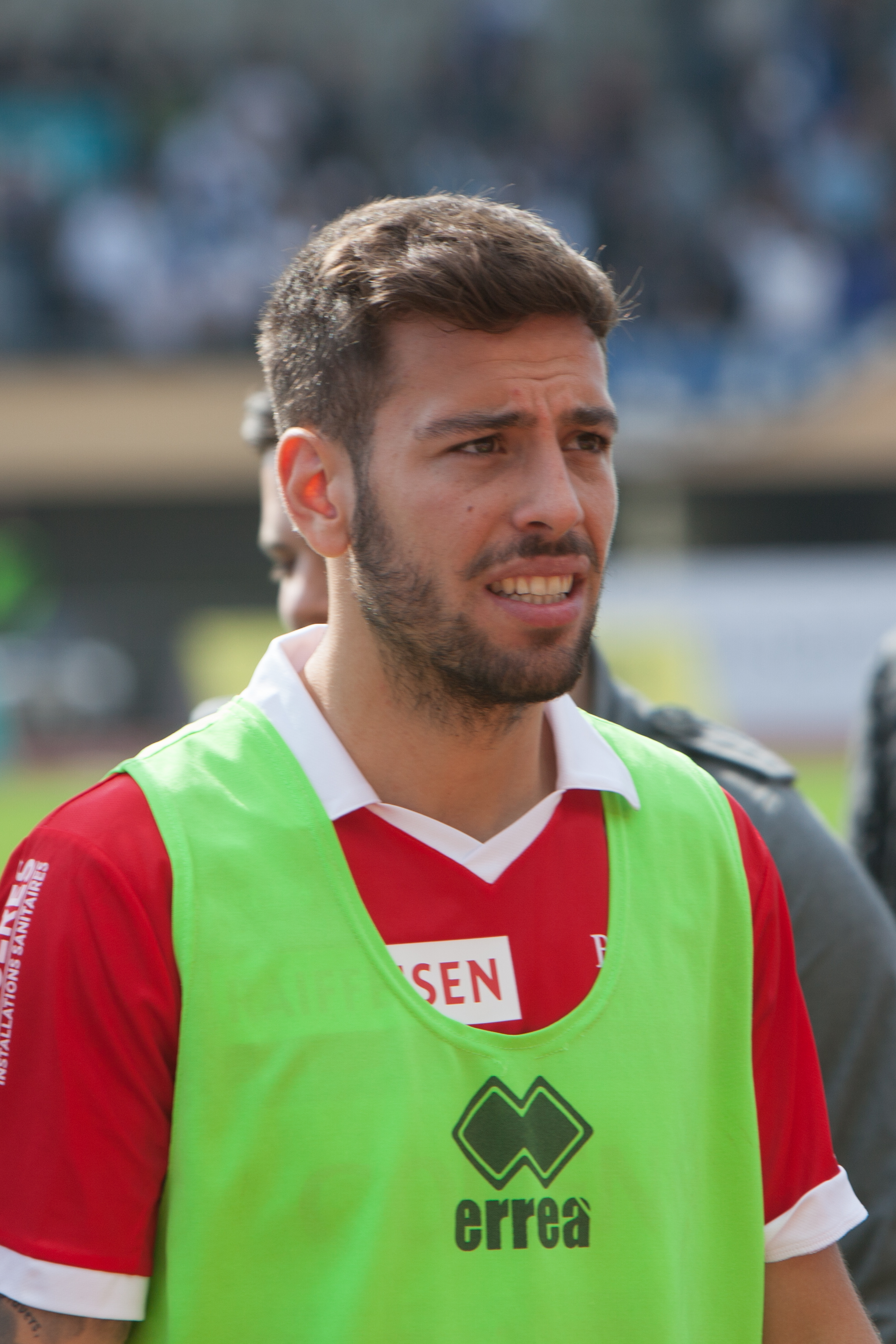 Lausanne Sport vs FC Sion - Avril 2014 - Max Veloso